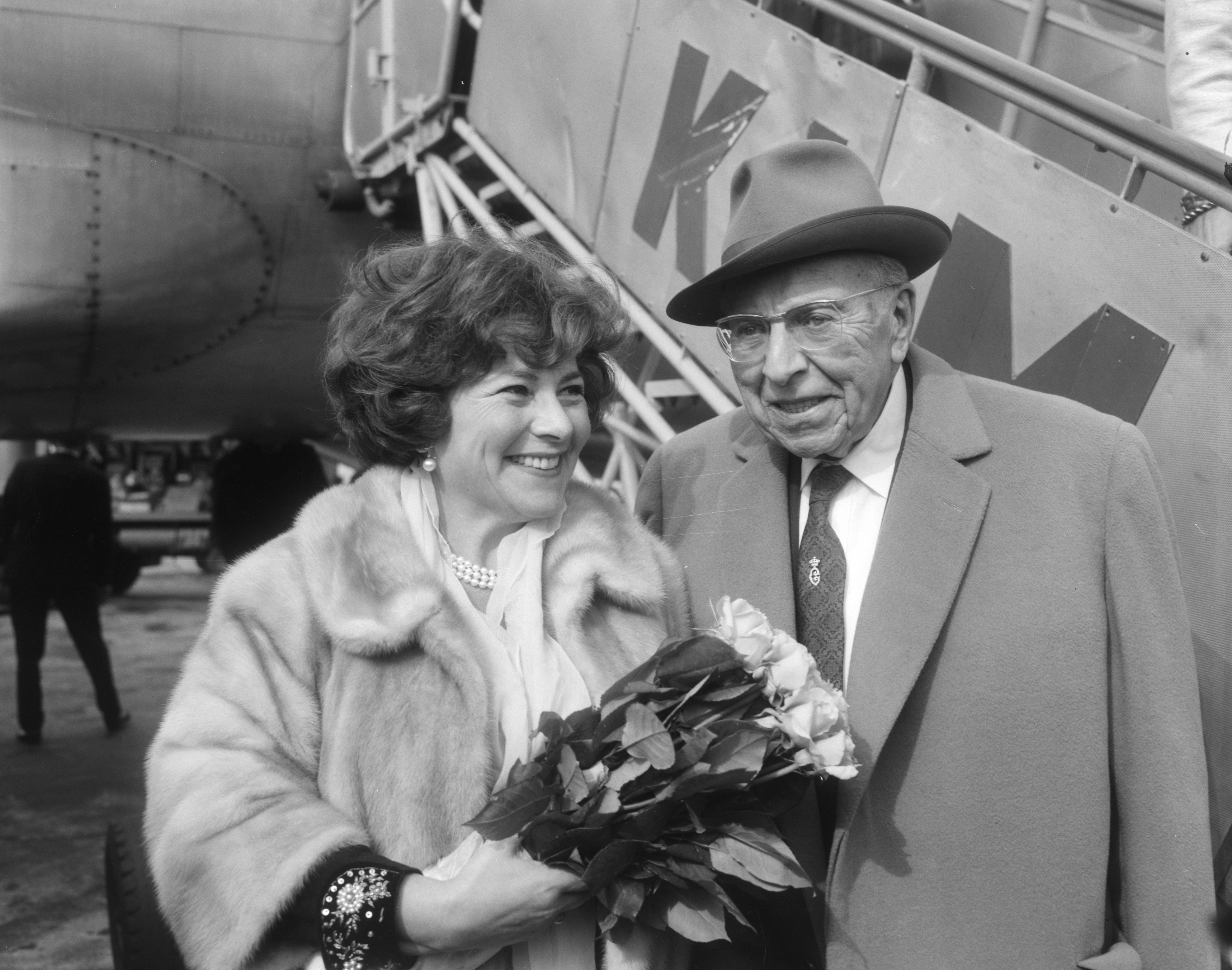 Collectie / Archief : Fotocollectie Anefo Reportage / Serie : Aankomst van Robert Stolz op Schiphol met het Japanse zangduo The Peanuts Beschrijving : Robert Stolz met zijn echtgenote Datum : 29 september 1966 Locatie : Noord-Holland, Schiphol Trefwoorden : aankomst en vertrek, dirigenten, groepsportretten Persoonsnaam : Stolz, Robert Fotograaf : Bilsen, Joop van / Anefo Auteursrechthebbende : Nationaal Archief Materiaalsoort : Negatief (zwart/wit) Nummer archiefinventaris : bekijk toegang 2.24.01.04 Bestanddeelnummer : 919-6183